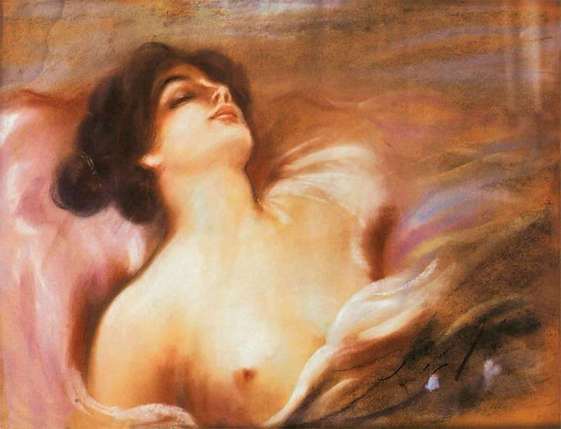 "Półakt kobiecy", oil on canvas